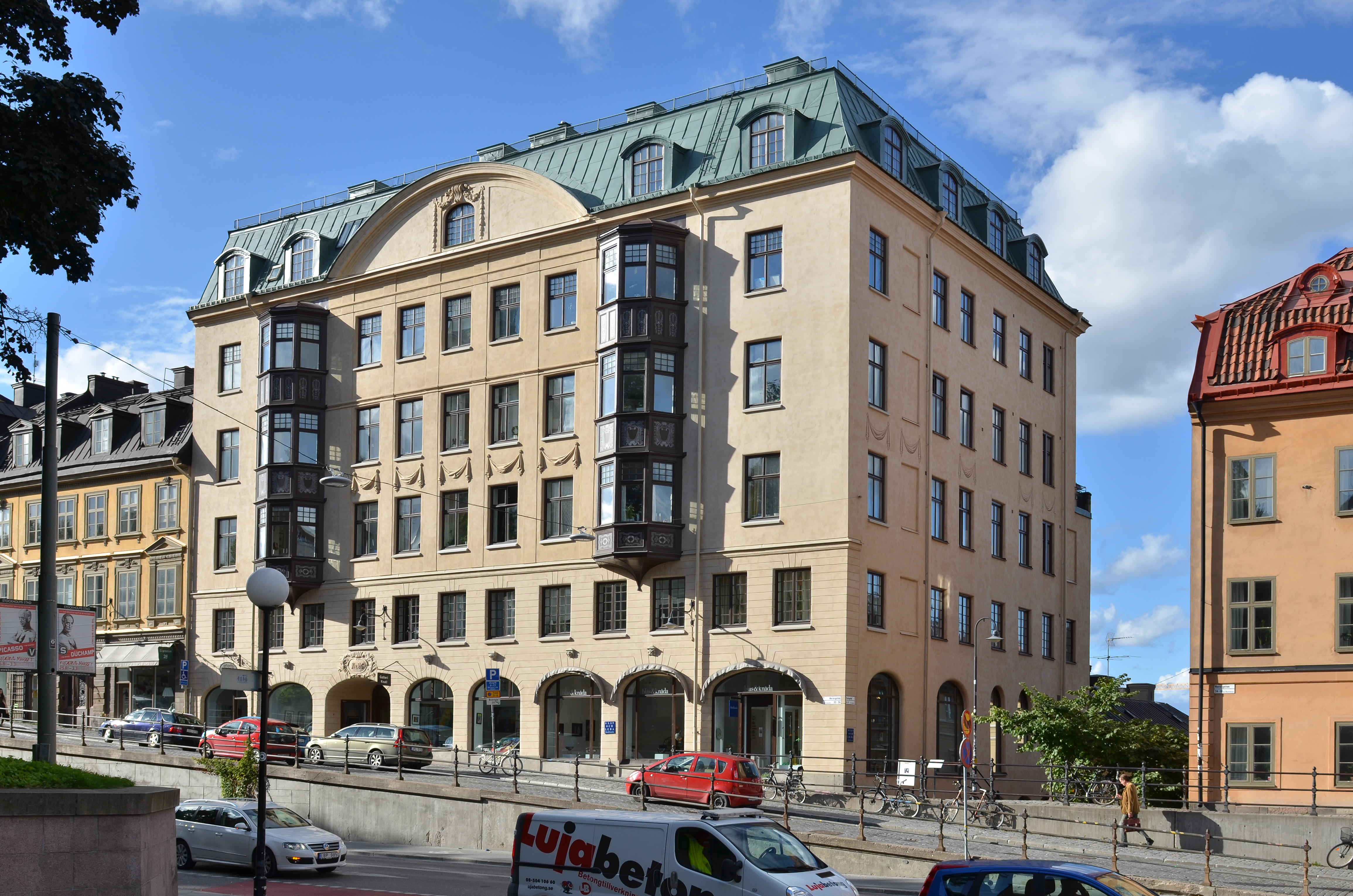 Hornsgatan 26, Södermalm, Stockholm. Ombyggnad 1905-1908 efter ritningar av Otilius Österberg